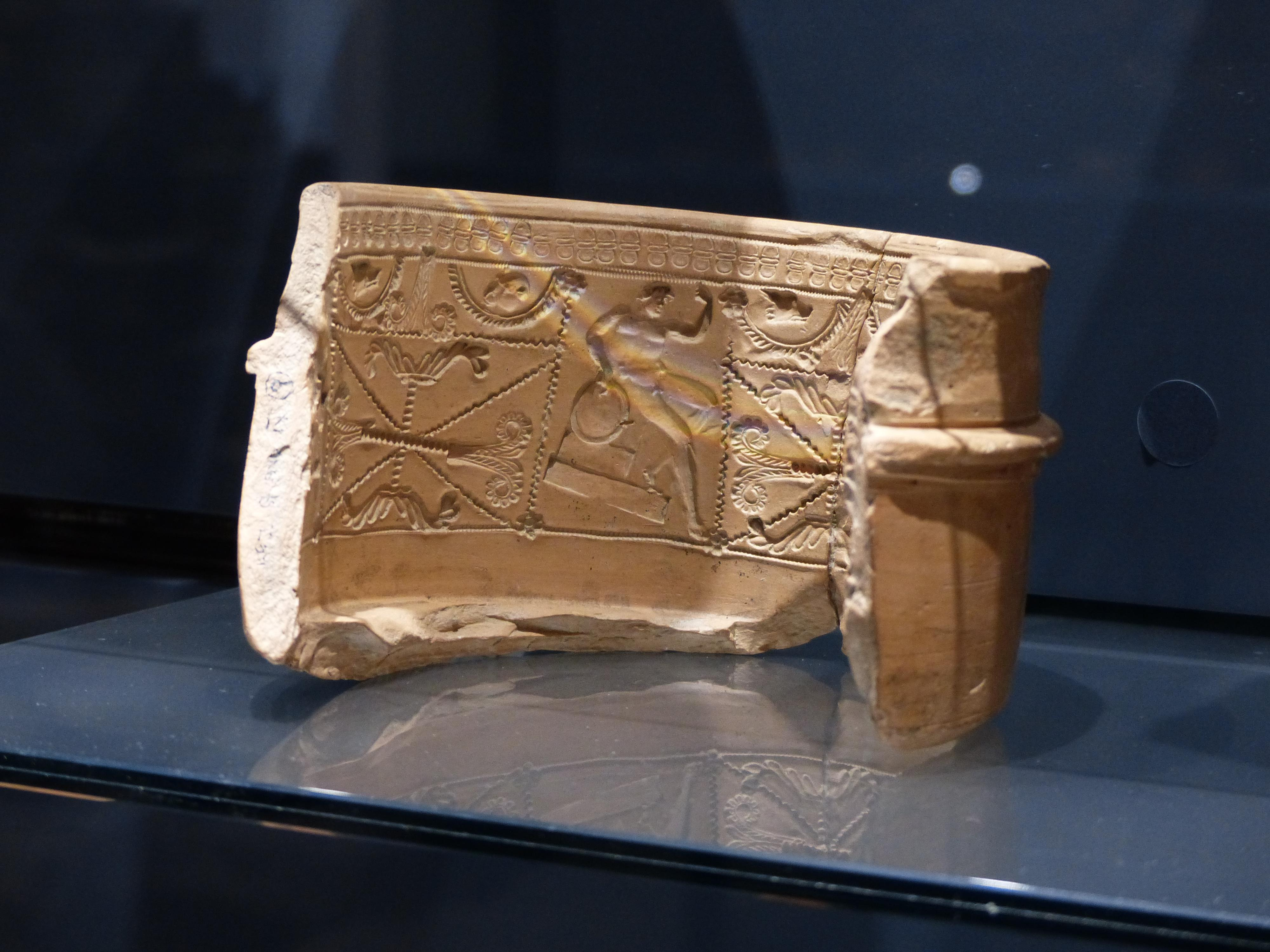 Musée de la Céramique de Lezoux (Puy-de-Dôme). Moule d'une coupe de céramique sigillée gallo-romaine de Lezoux. Forme Drag 30. IIe siècle.